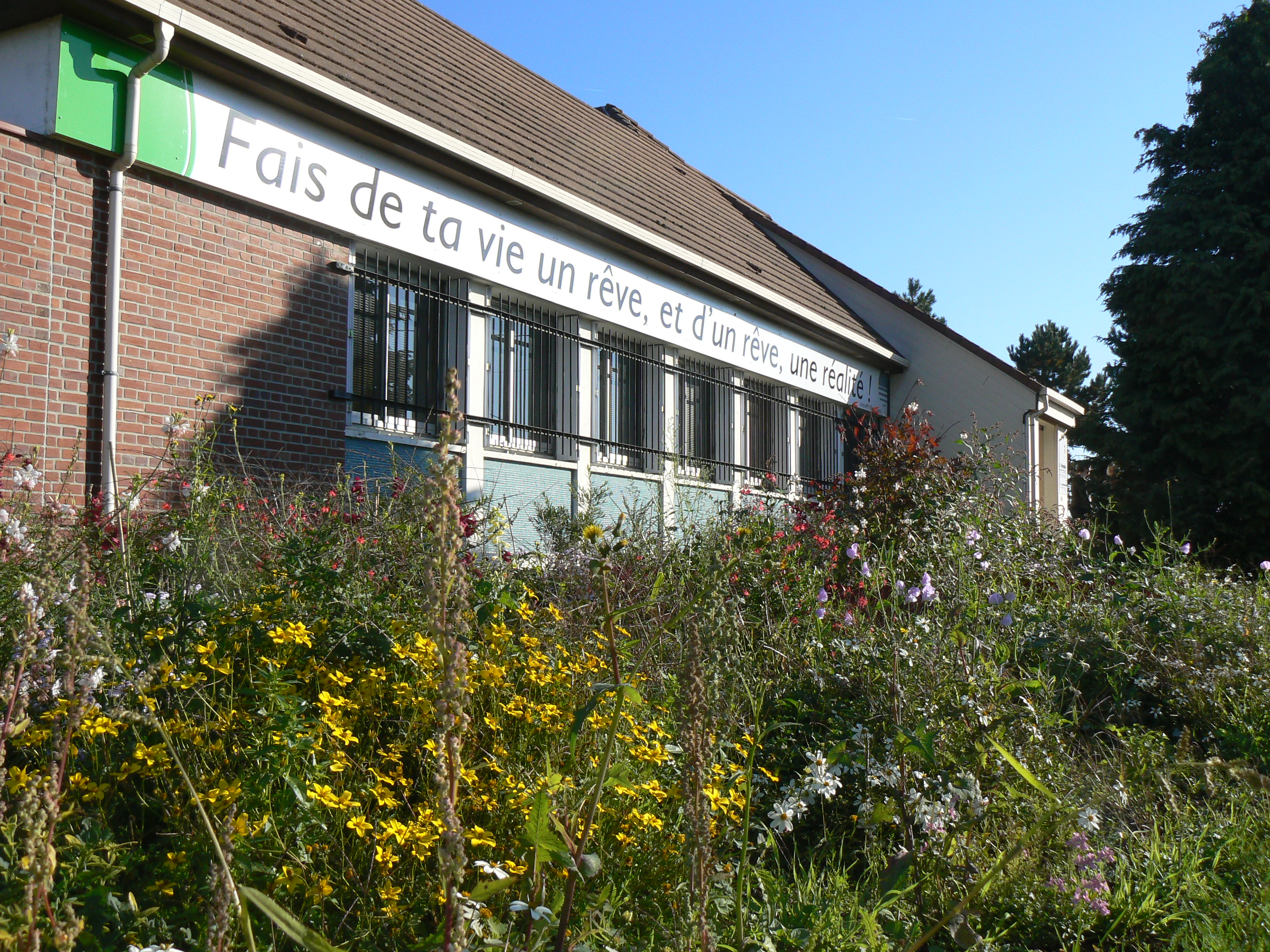 Le Tremplin, maison des initiatives et des ressources (Pont-de-l'Arche) en 2011